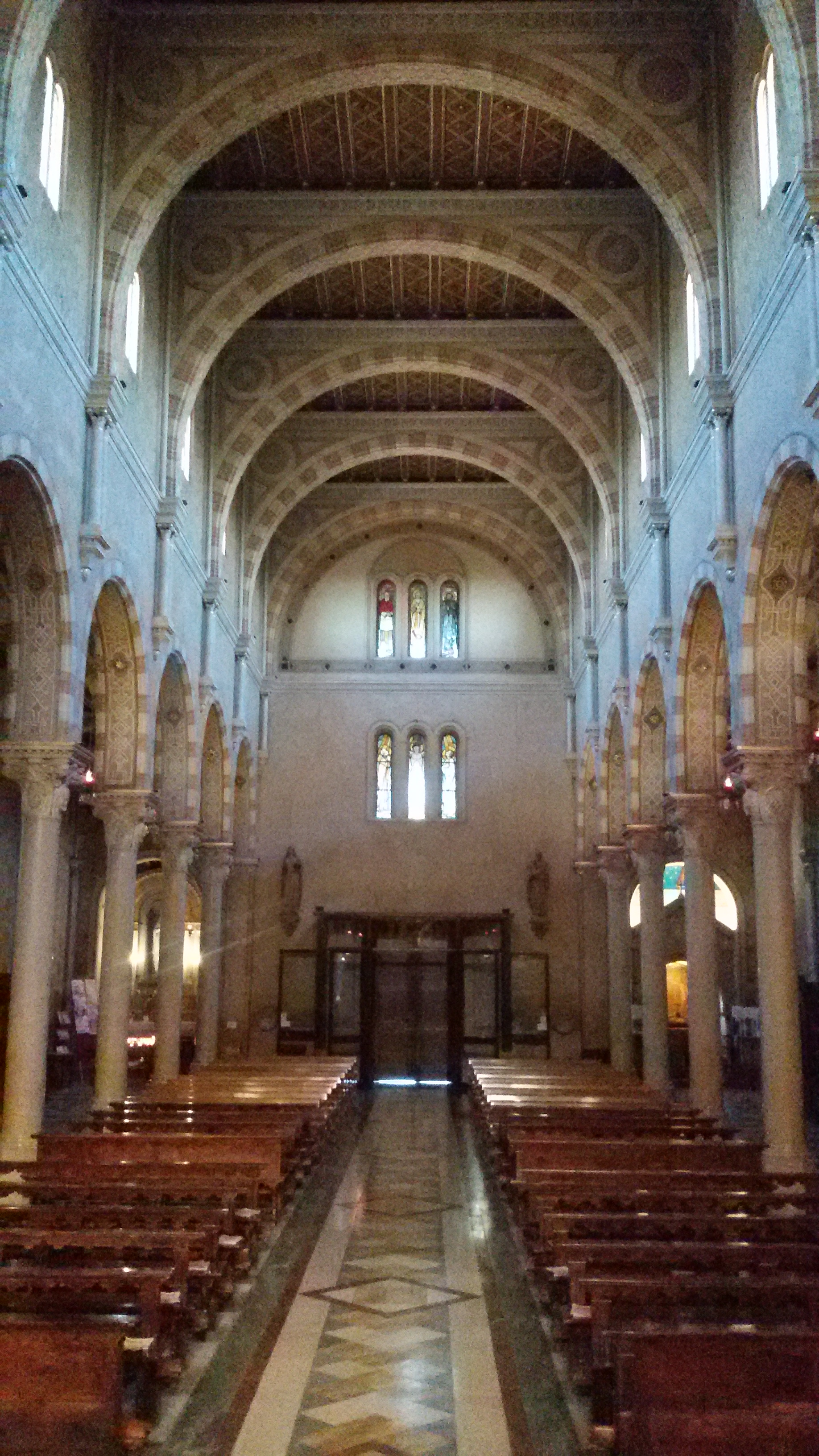 Chiesa di Santa Cristina Quinto di Treviso